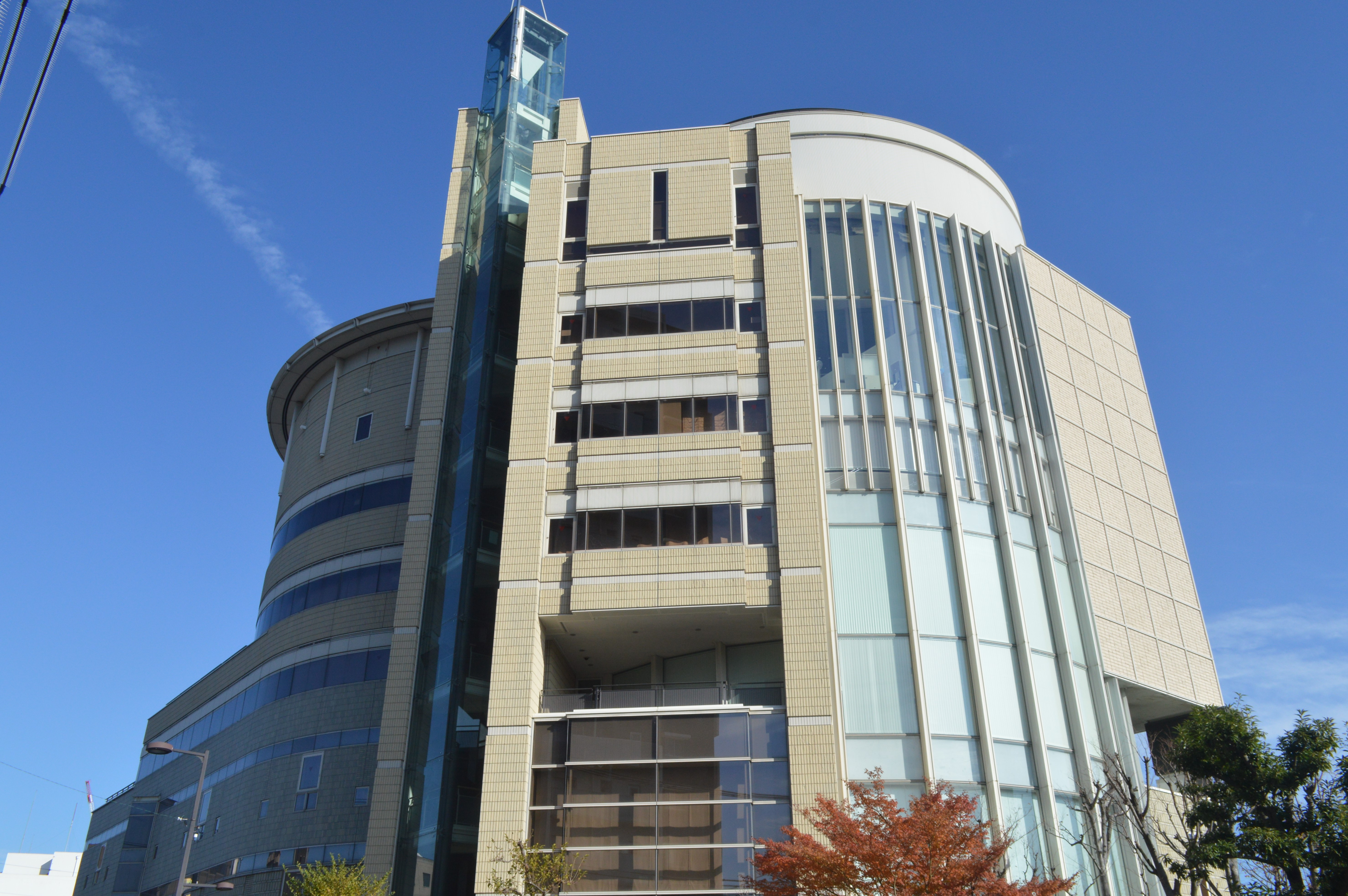 岐阜県多治見市の複合施設「まなびパークたじみ」。